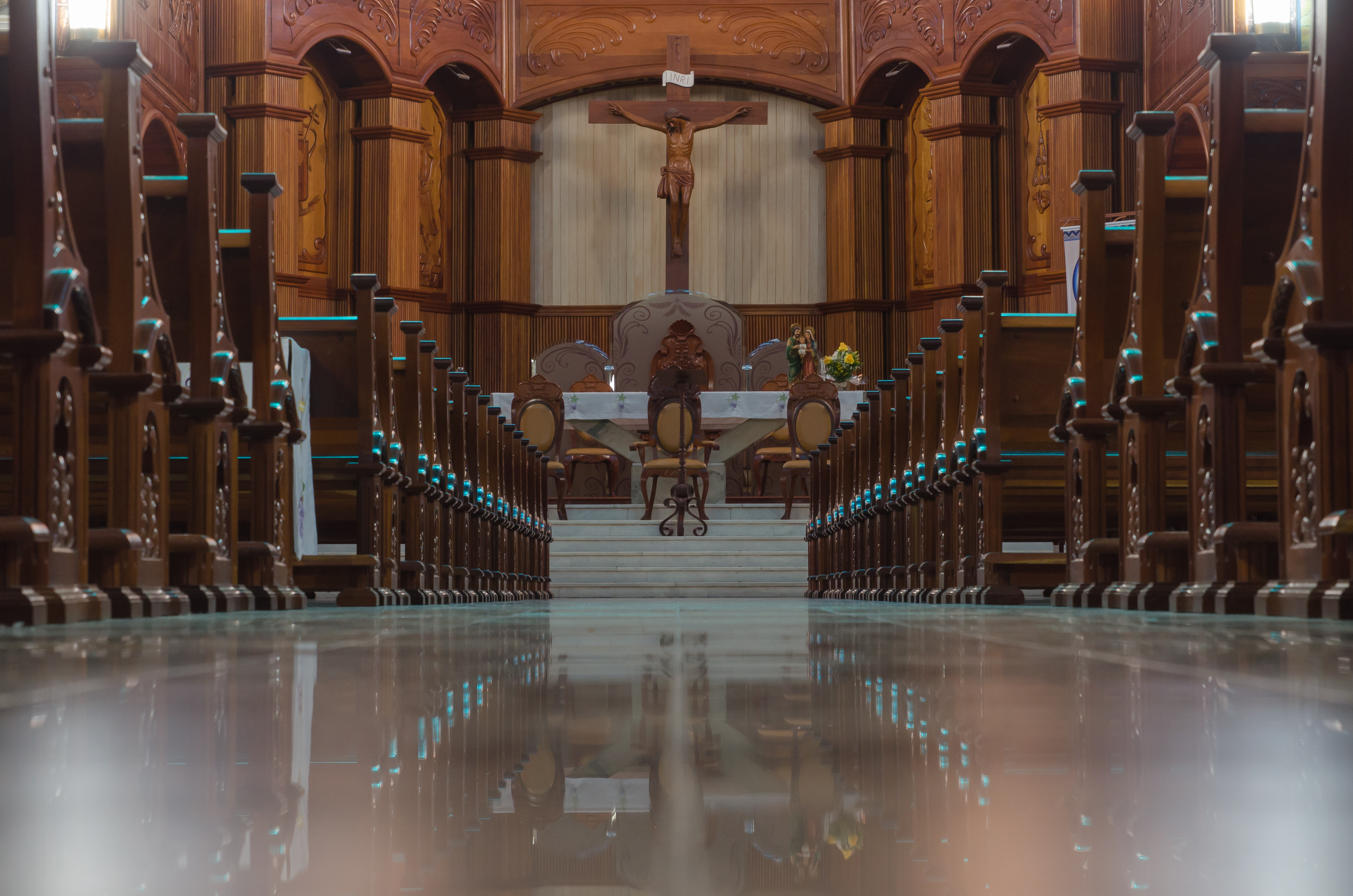 BELA CATEDRAL.